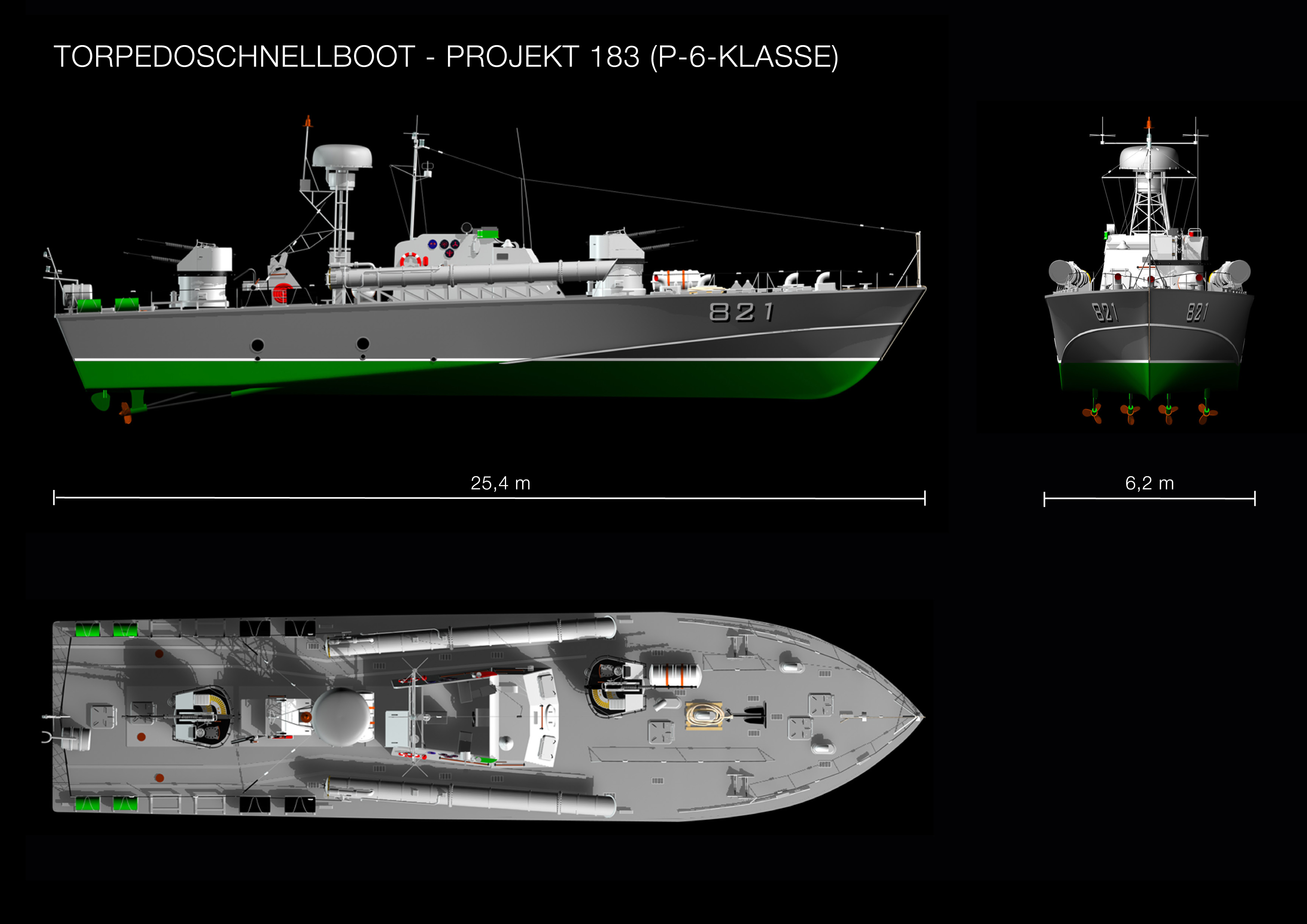 Dreiseitendarstellung des Torpedoschnellbootes Projekt 183/Typ P-6